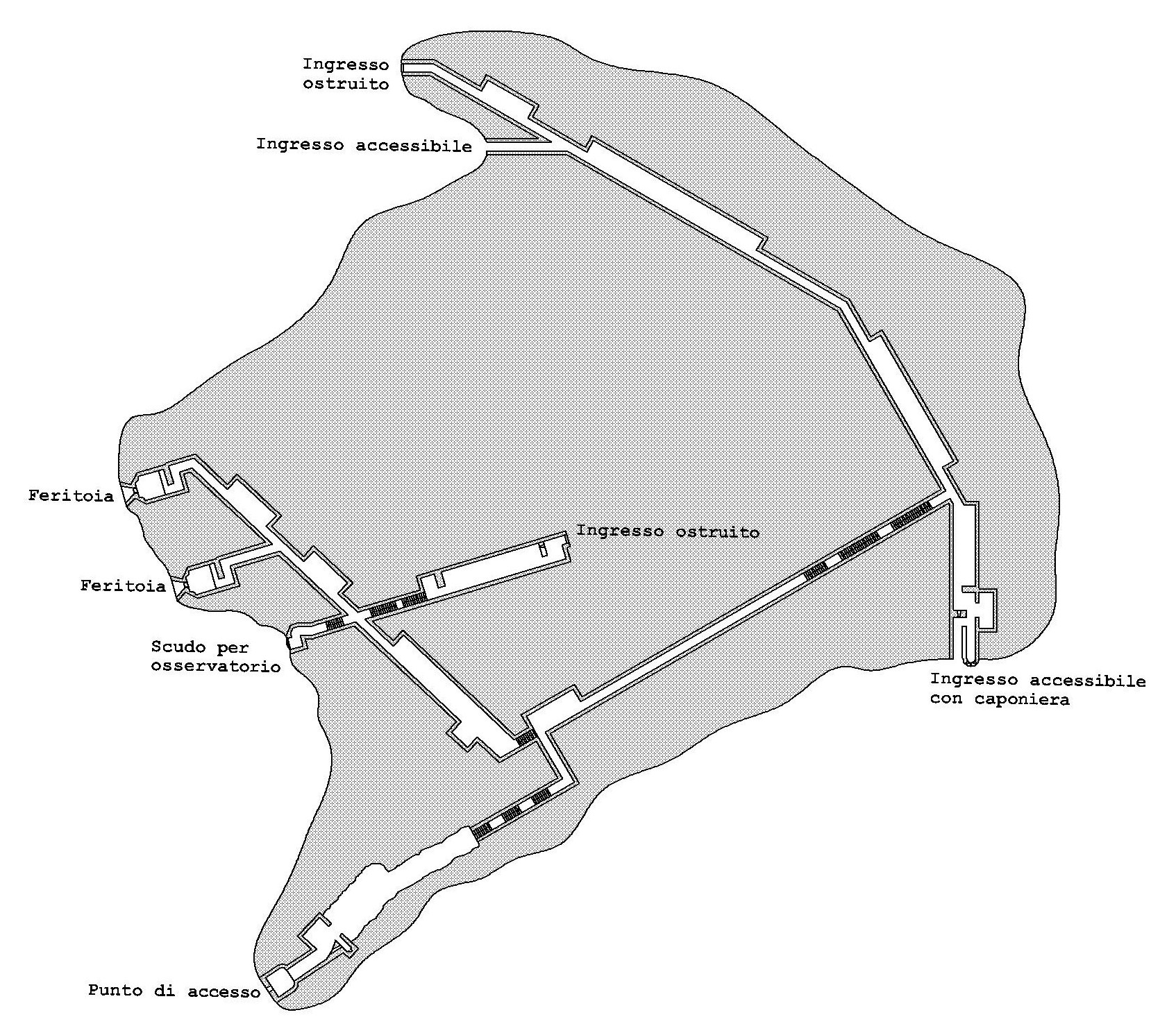 Opera 20 Piantina-Sbarramento Bolzano